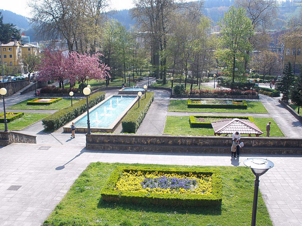 Ordizia, Guipúzcoa